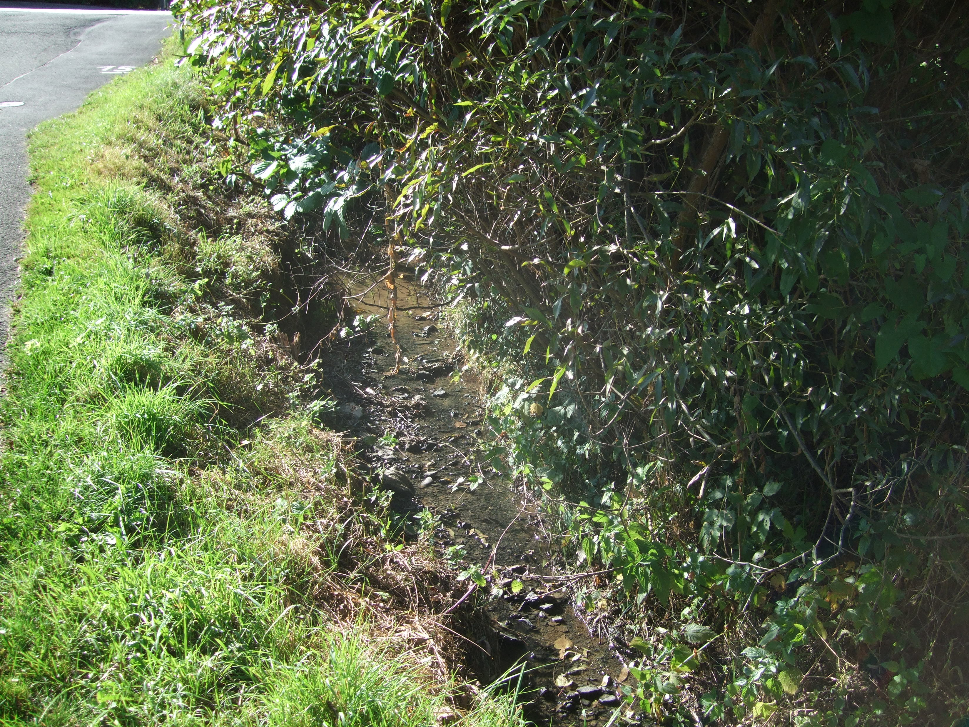 Der Arnsbach bei Neu-Anspach